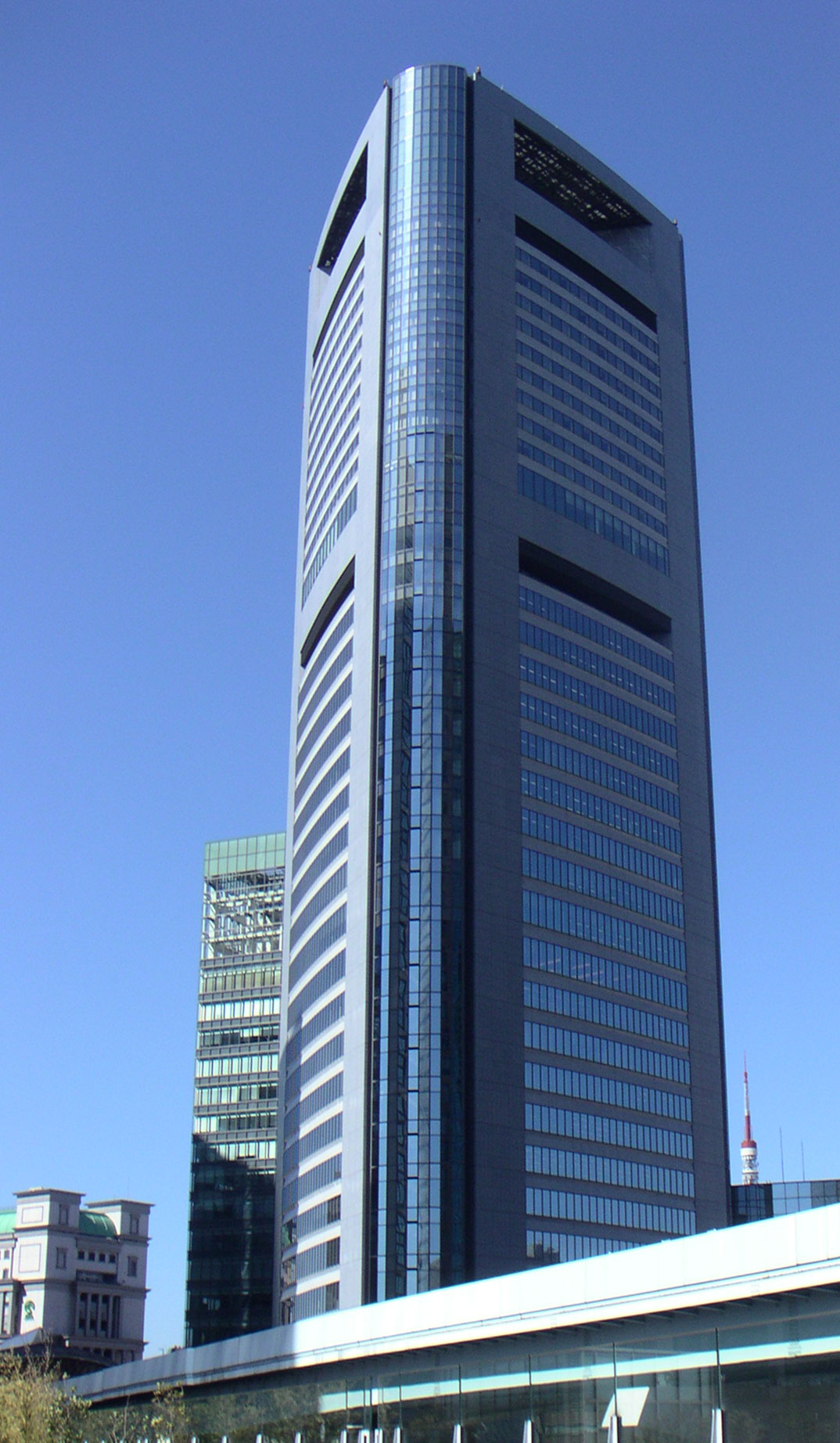 Shiodome Media Tower ja: 汐留メディアタワー